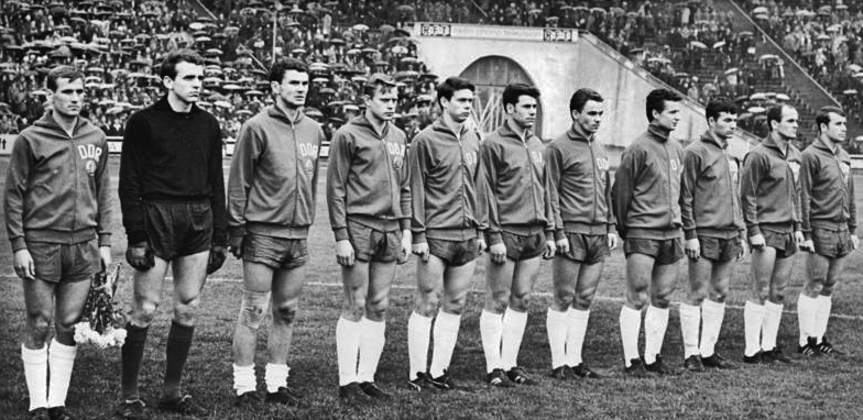 Zentralbild Kluge 25.4.1968 Leipzig: Fußball-Olympia-Qualifikationsspiel DDR-Bulgarien 3:2 am 24.4.1968 im Zentralstadion. Die DDR-Olympiamannschaft vor dem Spielbeginn (v.l.n.r.): Mannschaftskapitän Herbert Pankau, Torwart Jürgen Croy, Wolfgang Wruck, Bernd Bransch, Jürgen Sparwasser, Eberhard Vogel, Henning Frenzel, Dieter Erler, Wolfram Löwe, Otto Frässdorf und Peter Rock.